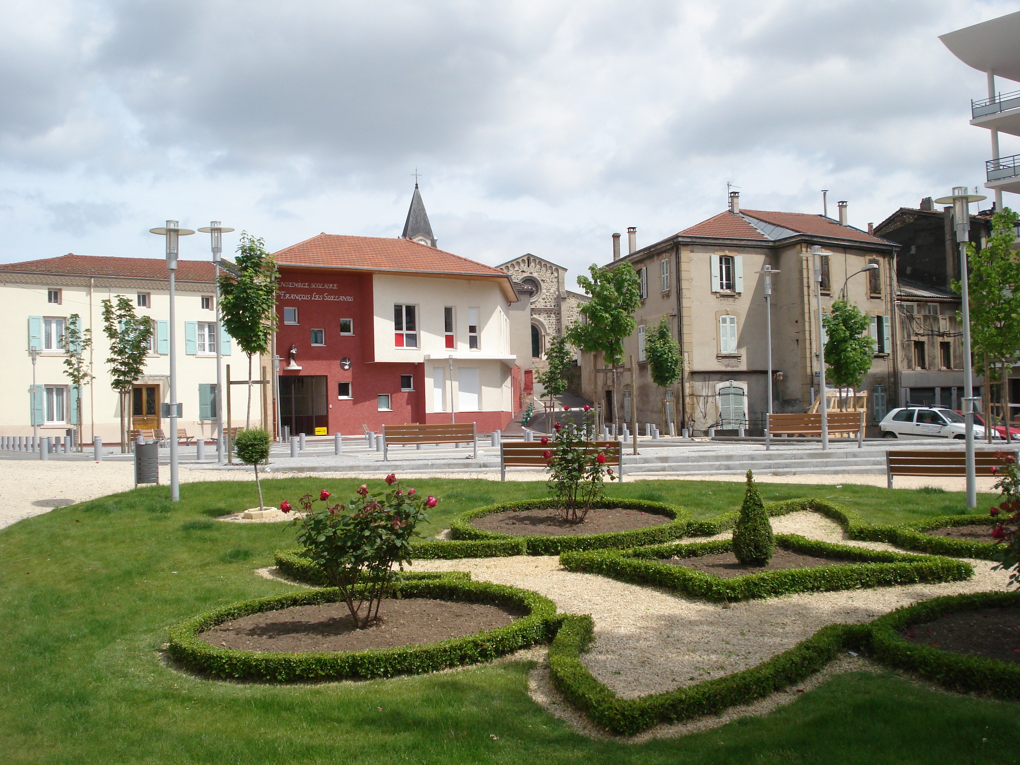 Saint-Rambert-d'Albon dans la Drôme